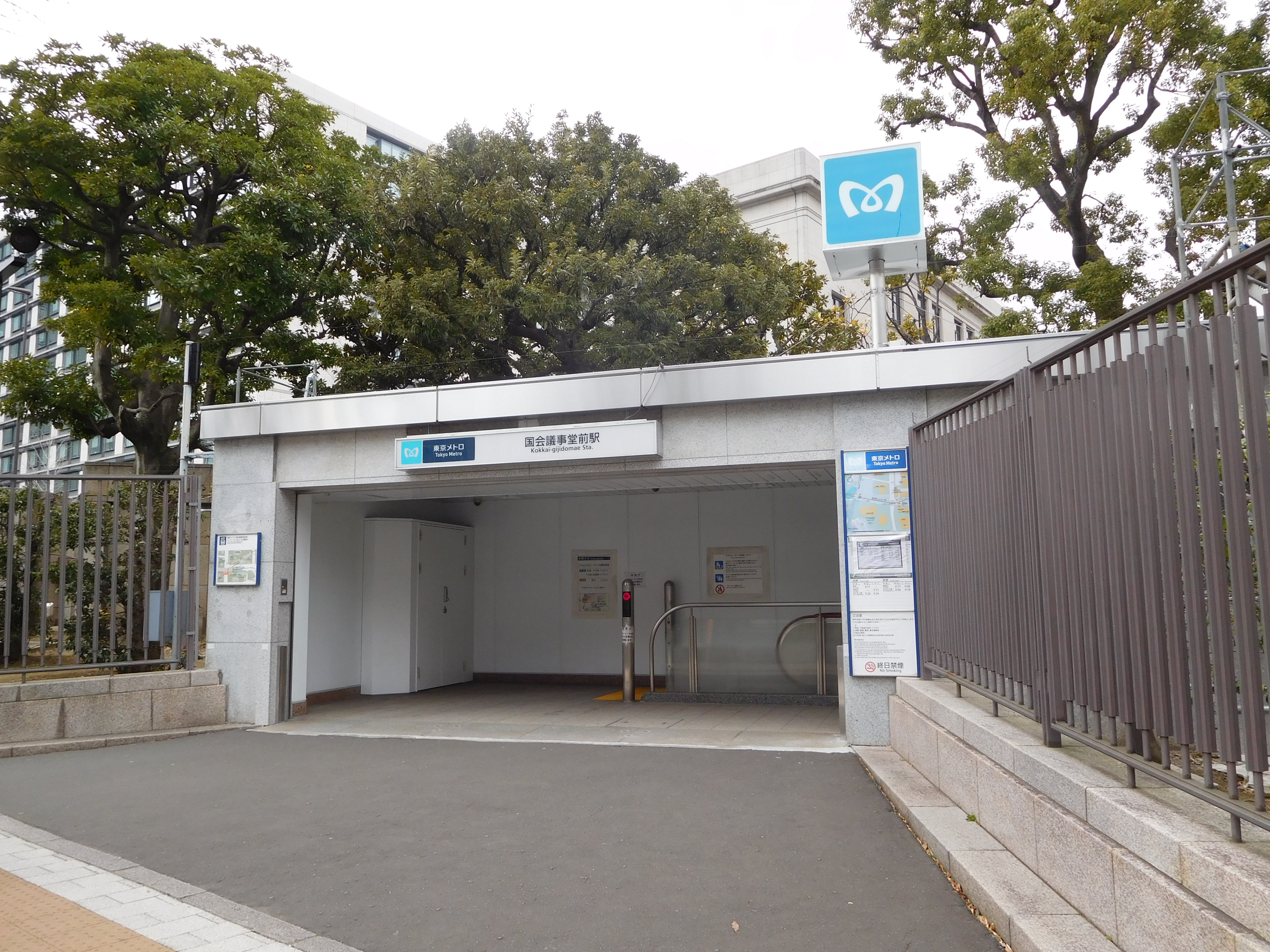 東京都千代田区永田町一丁目にある、東京メトロ丸ノ内線・千代田線国会議事堂前駅1番出口。